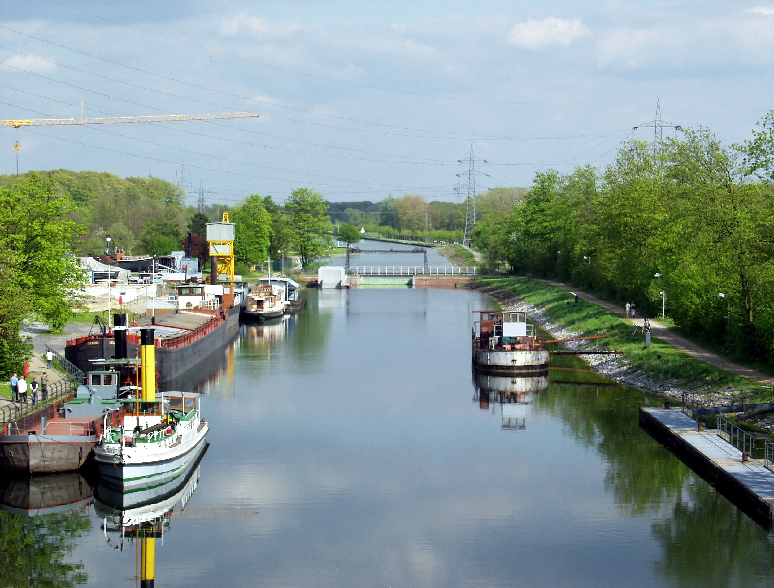 Altes Schiffshebewerk Henrichenburg - Museumsschiffe im Oberwasser